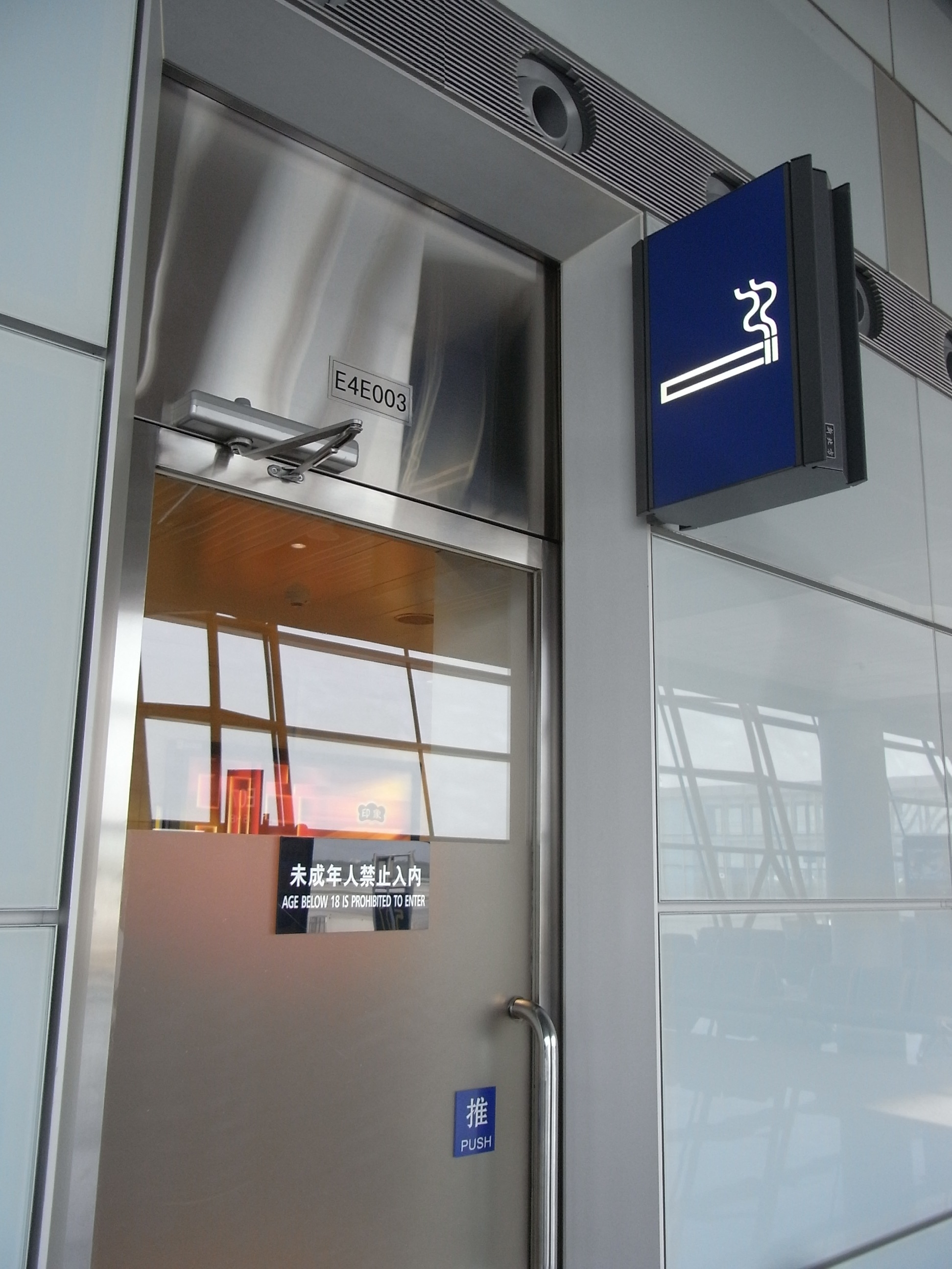 zh:2010年zh:8月北京 北京首都國際機場